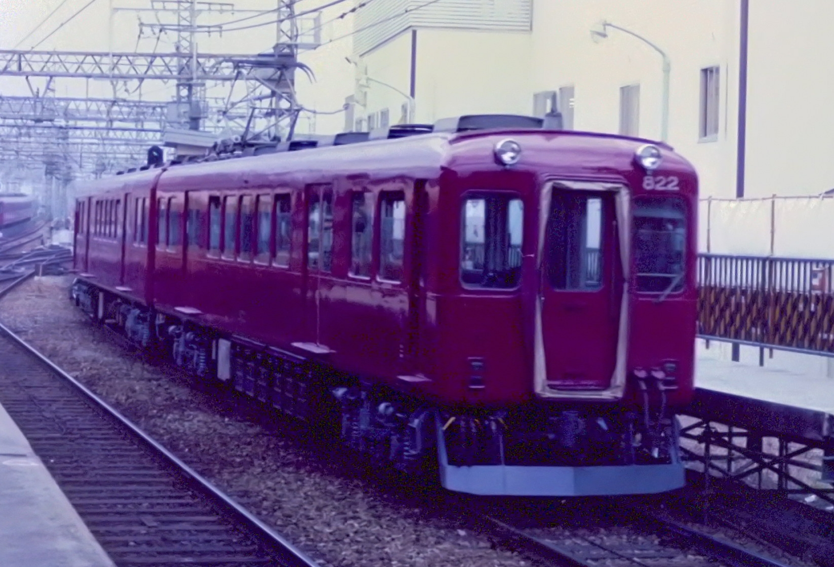 近鉄820系 1986年9月 大和西大寺駅